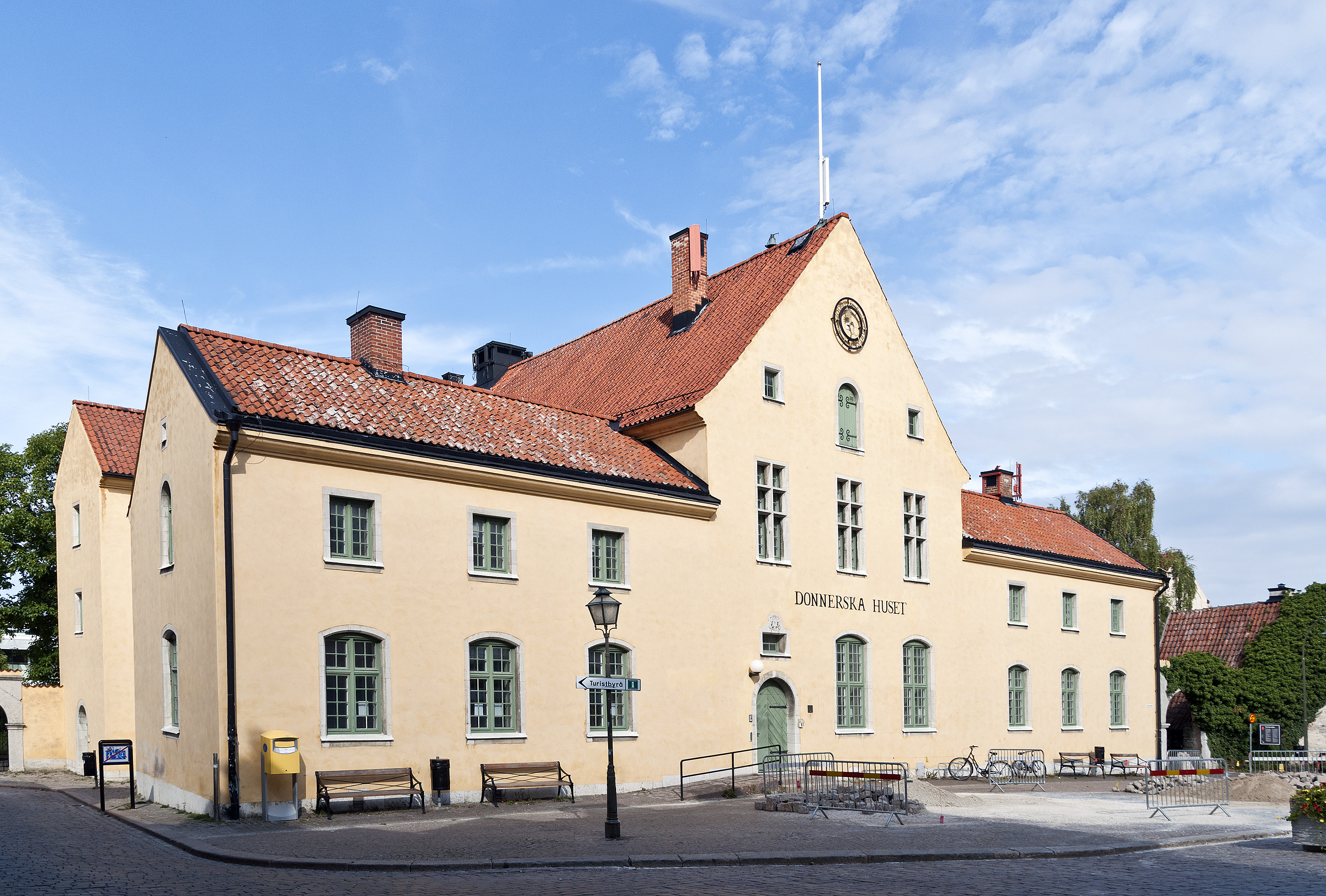 Visby Trafiken 1, KV TRAFIKEN 1, DONNERSKA HUSET I VISBY (FD RIKSBANKSHUSET), FD POSTHUSET) id - 21300000014474 name - Visby Trafiken 1, KV TRAFIKEN 1, DONNERSKA HUSET I VISBY (FD RIKSBANKSHUSET), FD POSTHUSET) address - Donners plats 1, Donnersgatan 8, Hamngatan 5 municipality - Gotland